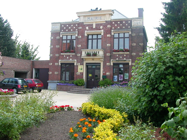 Mairie de Féchain